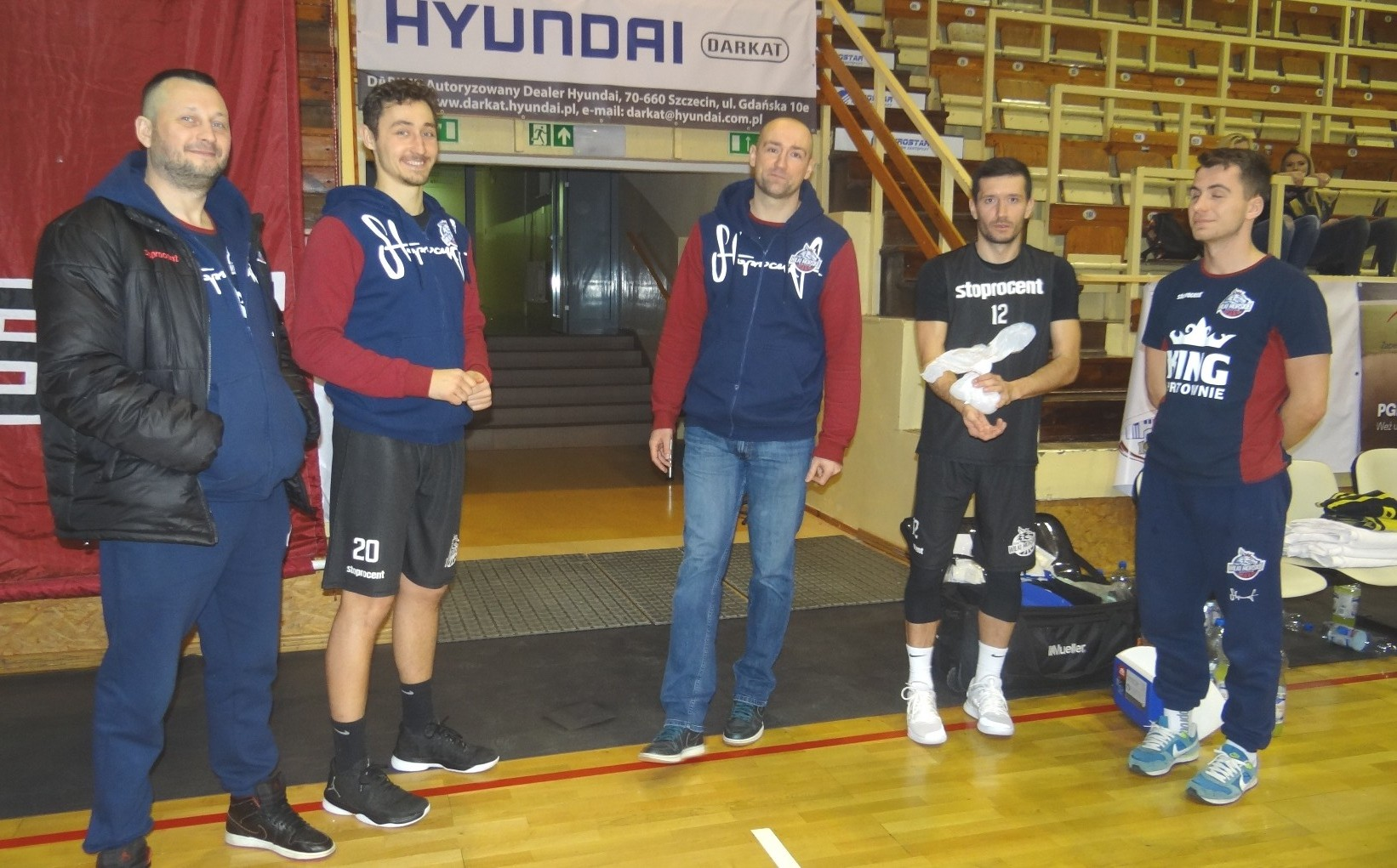 King Szczecin, 01.12.2018